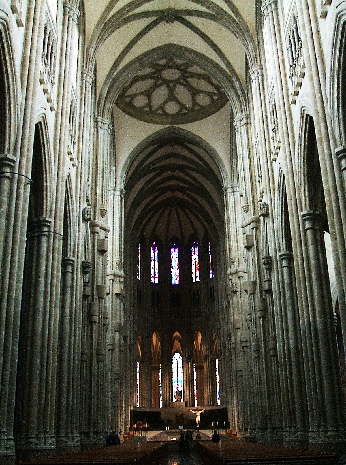 Nave central y cabecera de la Catedral Nueva de Vitoria-Gasteiz